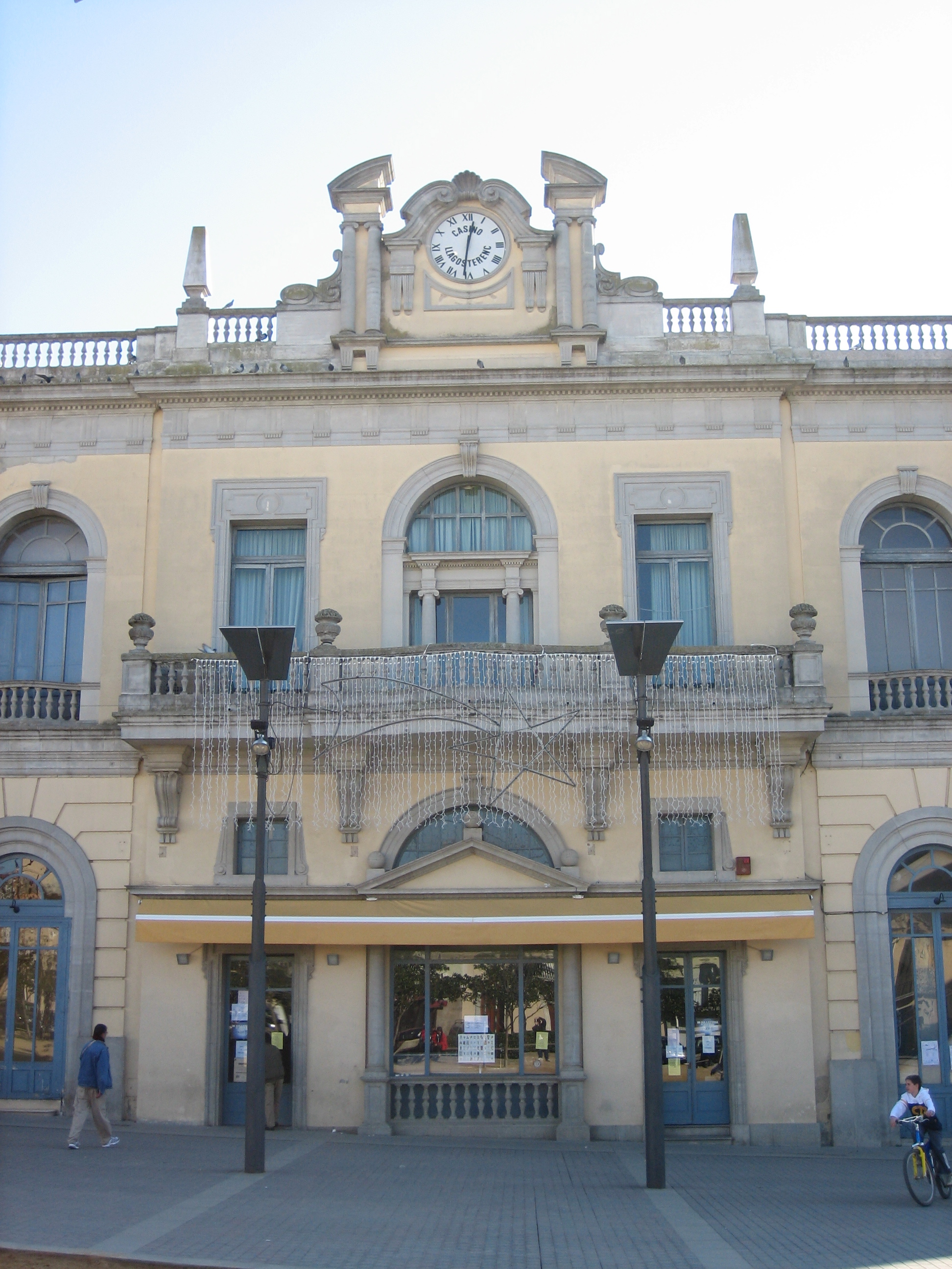 Entrada al Saló-Café del Casino de Llagostera (1928). Arquitecte: Josep Esteve